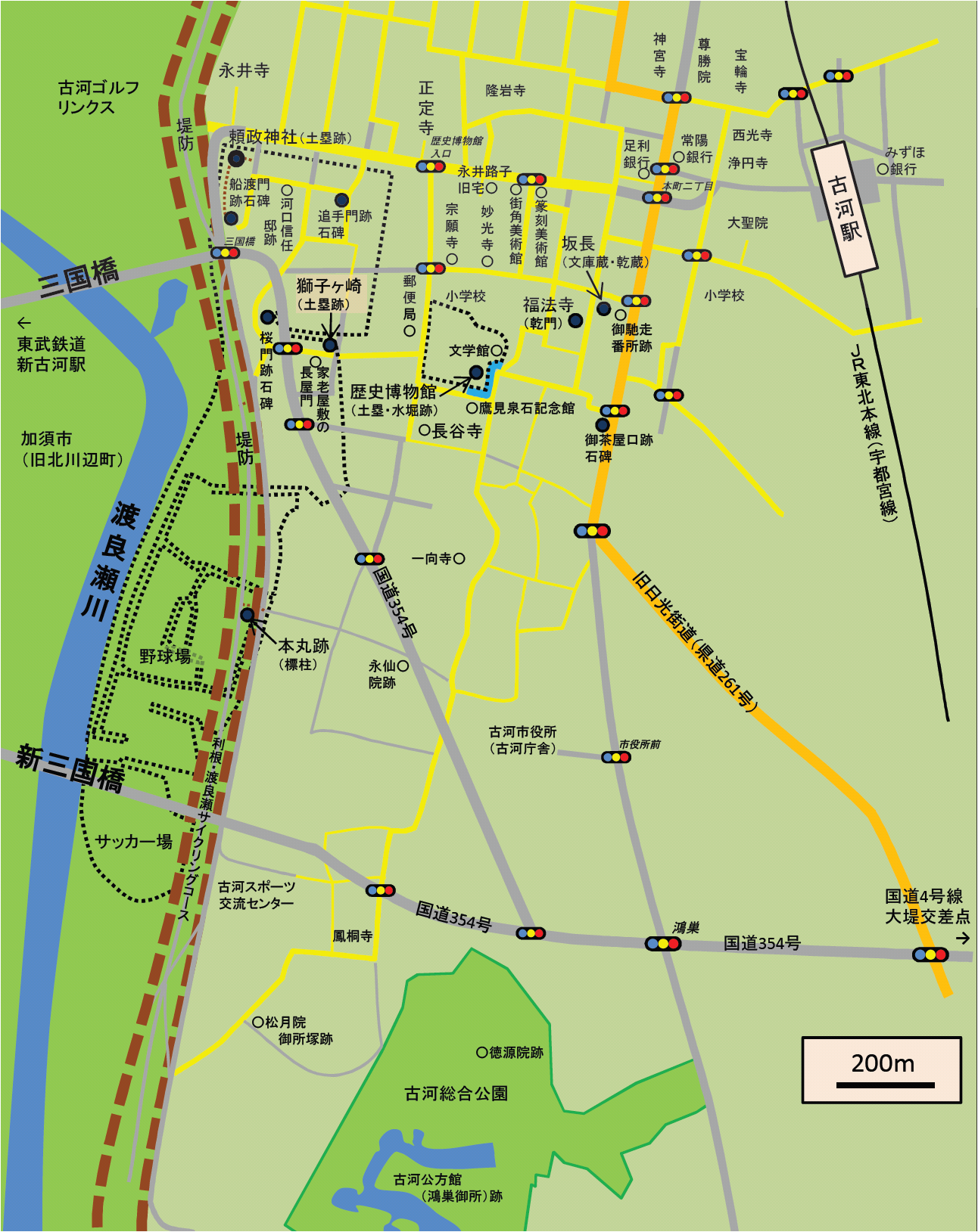 茨城県古河市にあった古河城の城址分布図